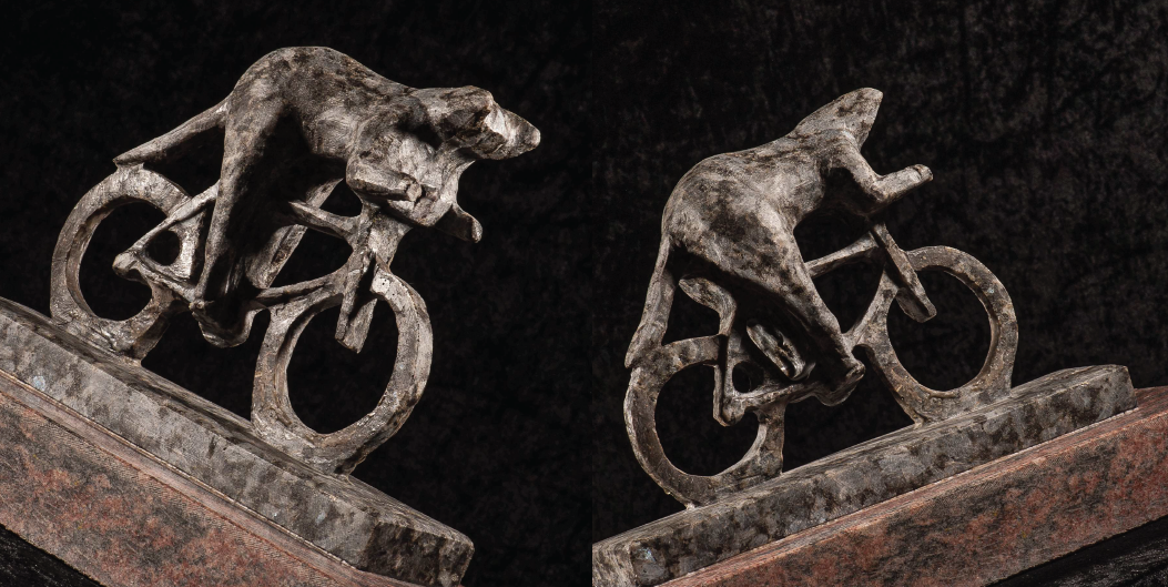 Skulptur "Leopard Trek"